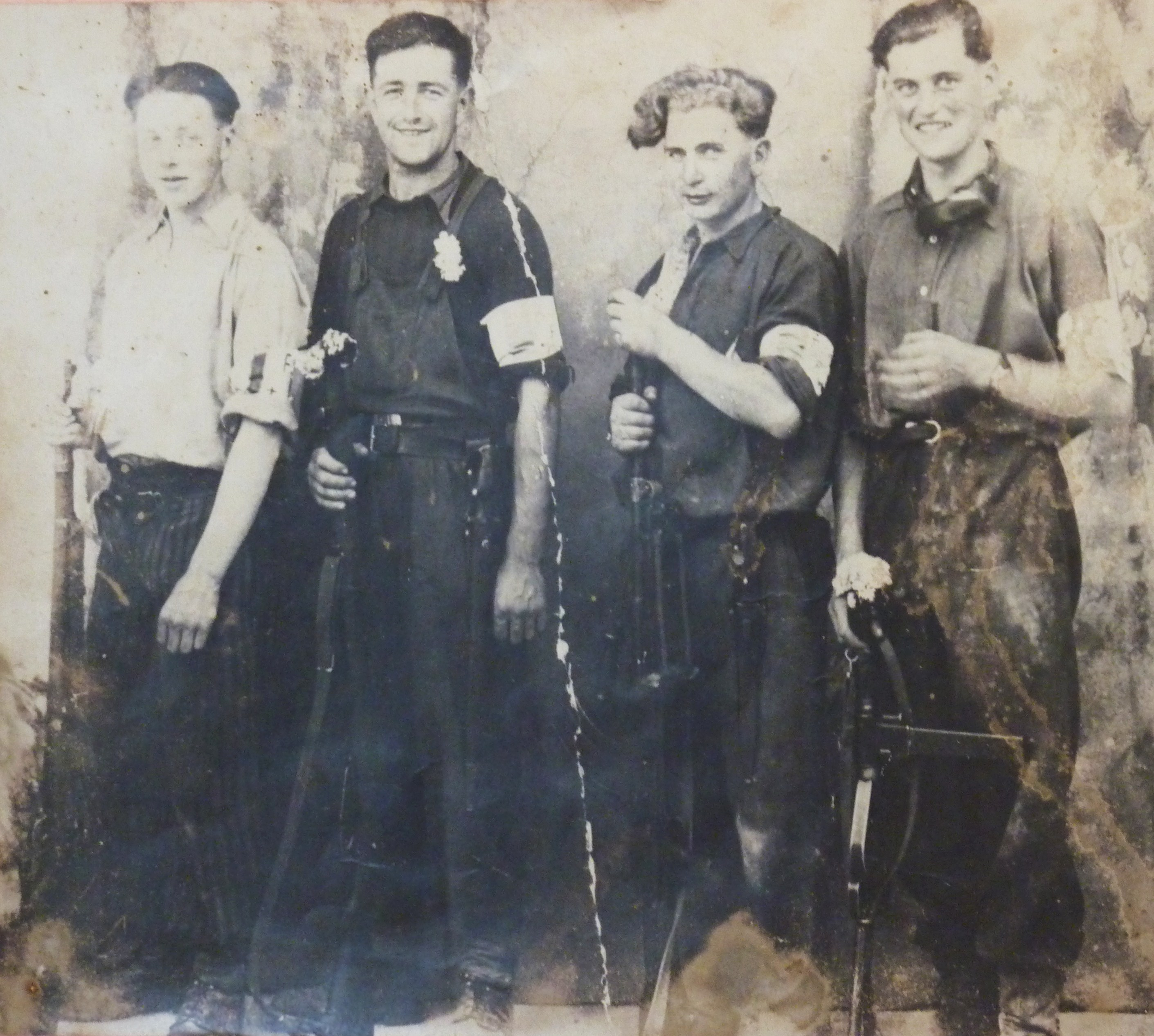 Résistants de la 2ème guerre mondiale dans la région d'Huelgoat